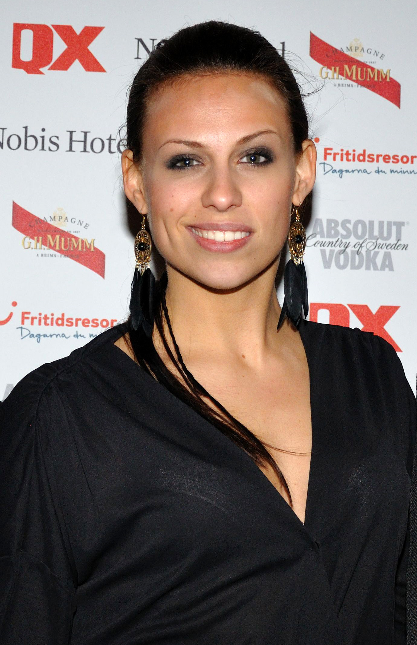 Gaygalan 2011 Sara Lumholdt